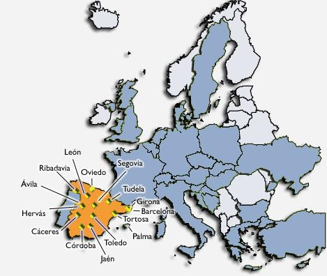 Mapa de la red de juderías en España